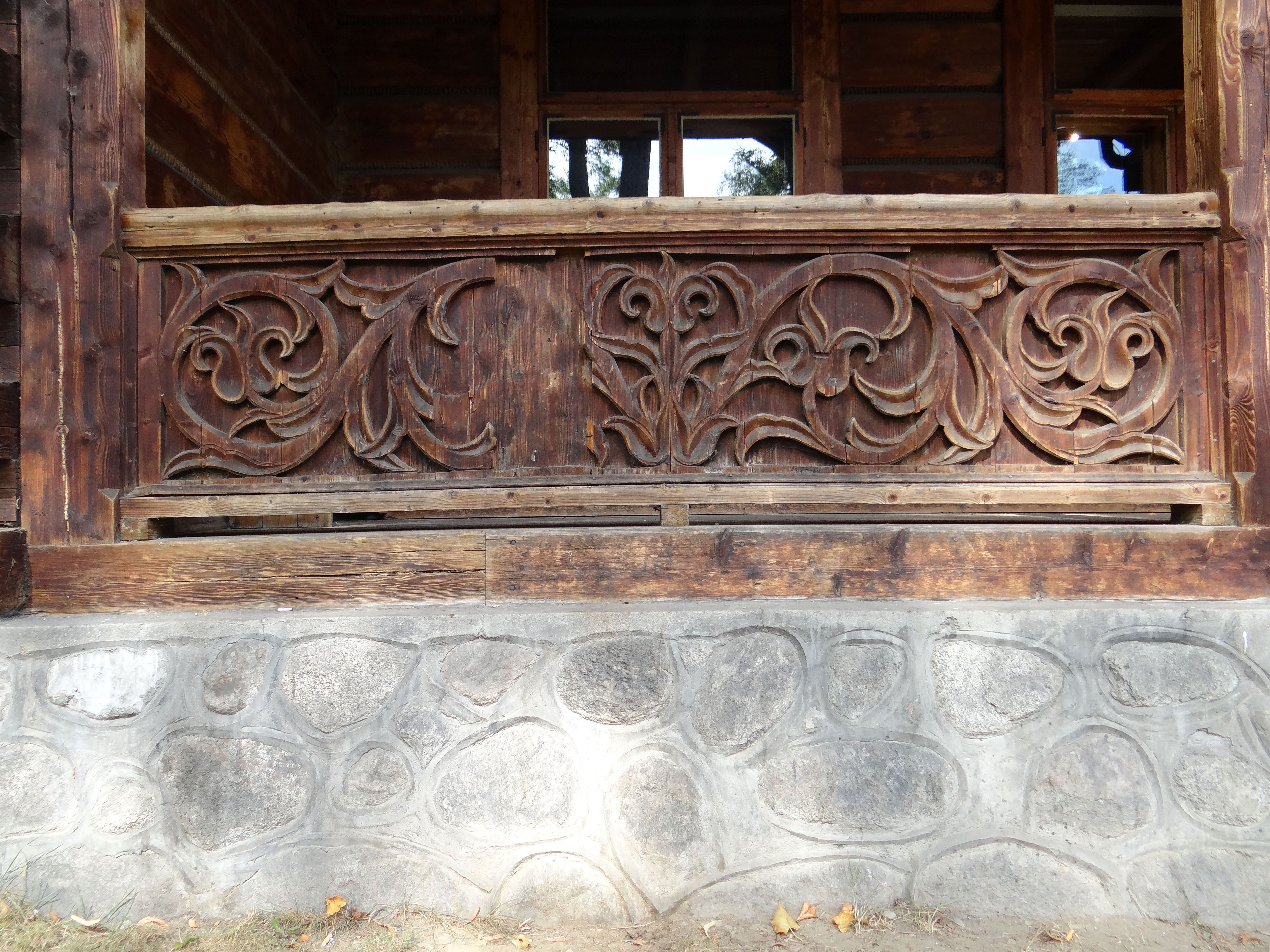 willa drewn. „Koliba” Zakopane, ul. Kościeliska 18, Zakopane